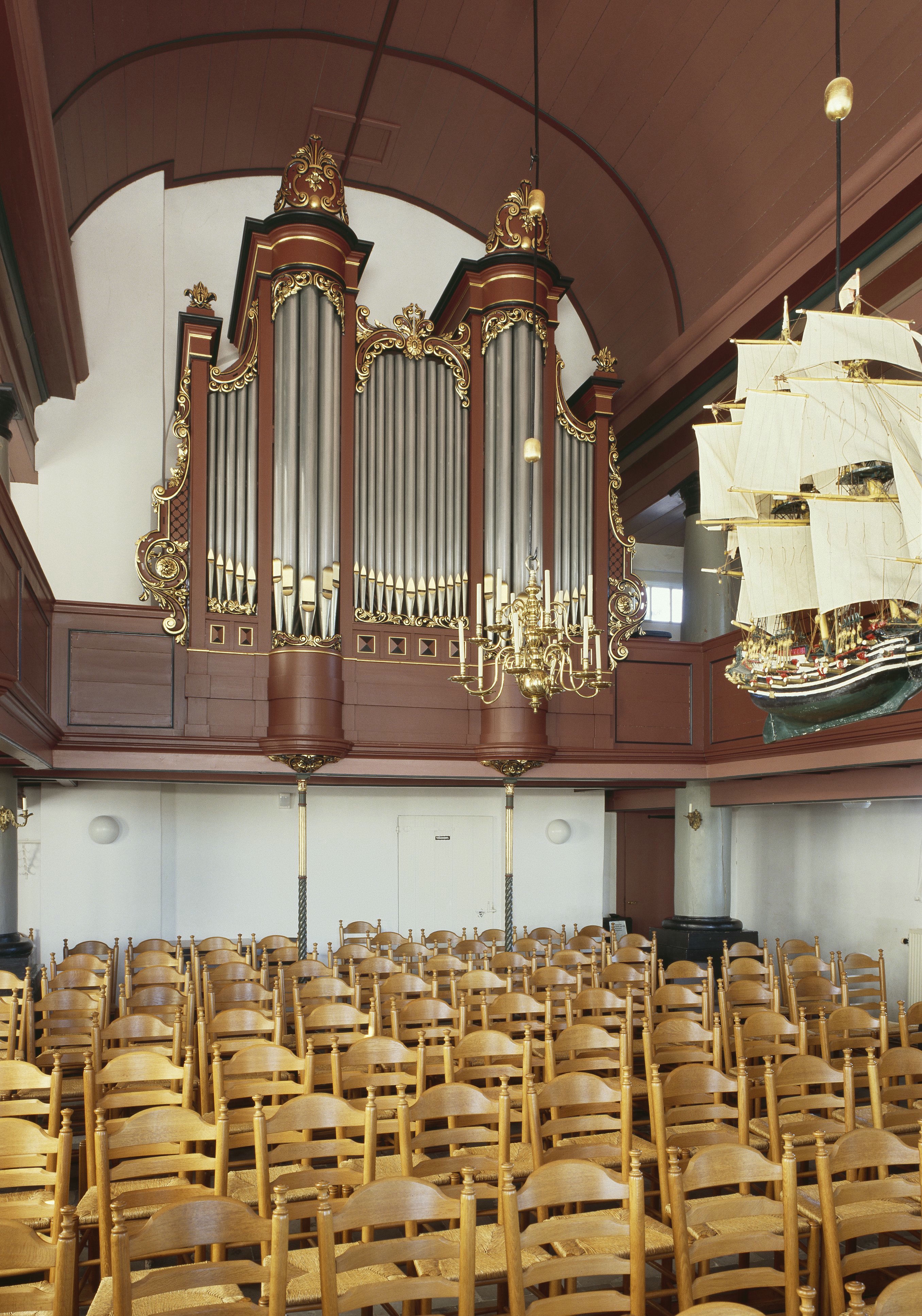 Kerkje Aan De Zee: Interieur, aanzicht orgel (opmerking: Gefotografeerd voor Het Historische Orgel in Nederland 1894-1901, bladzijde 361)